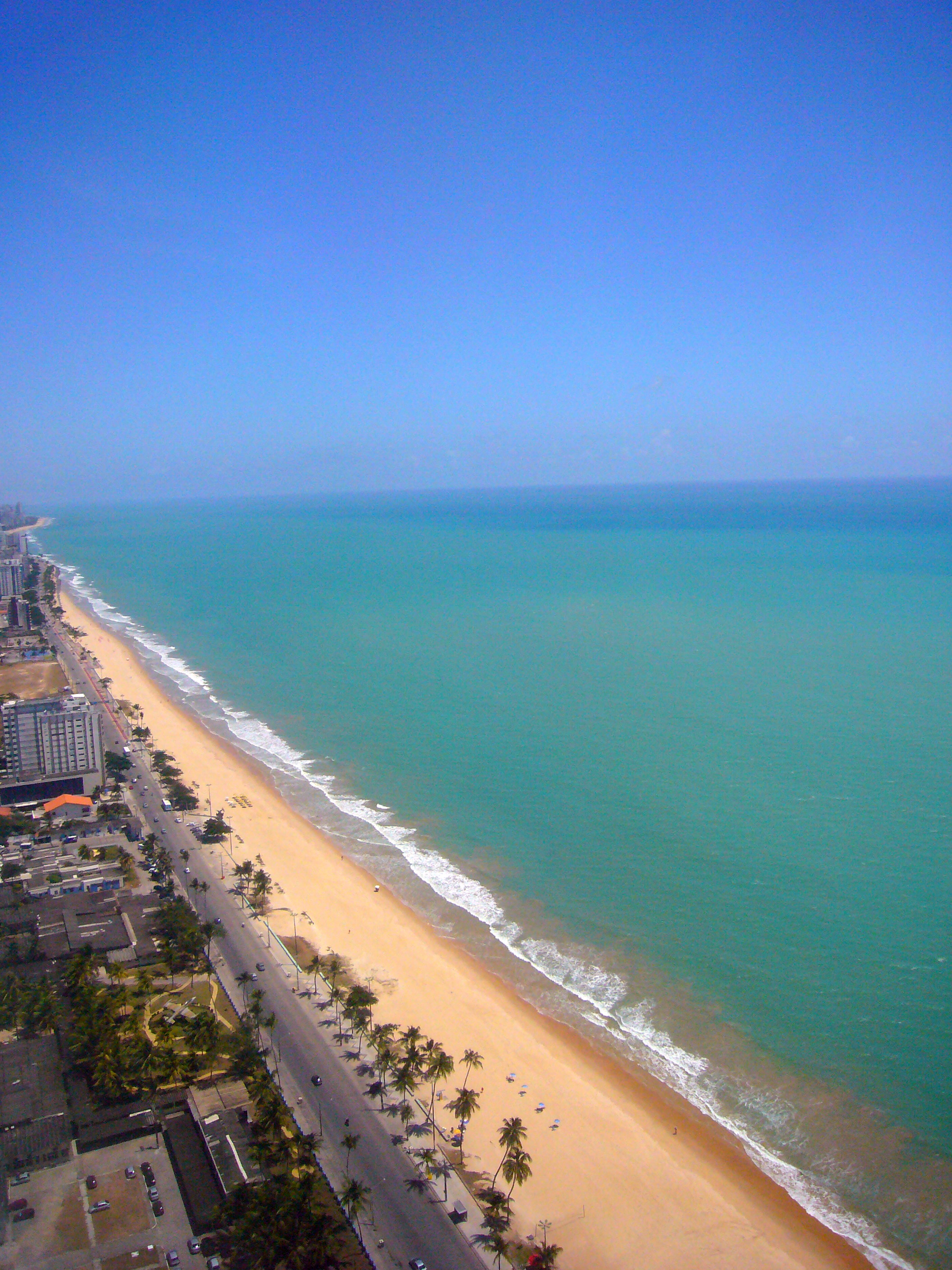 AIR